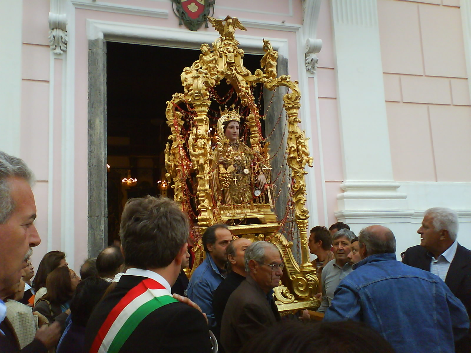 Santa Restituta, processione a Lacco Ameno, di cui è patrona; autore: Vito Calise, licenza PD-utente.